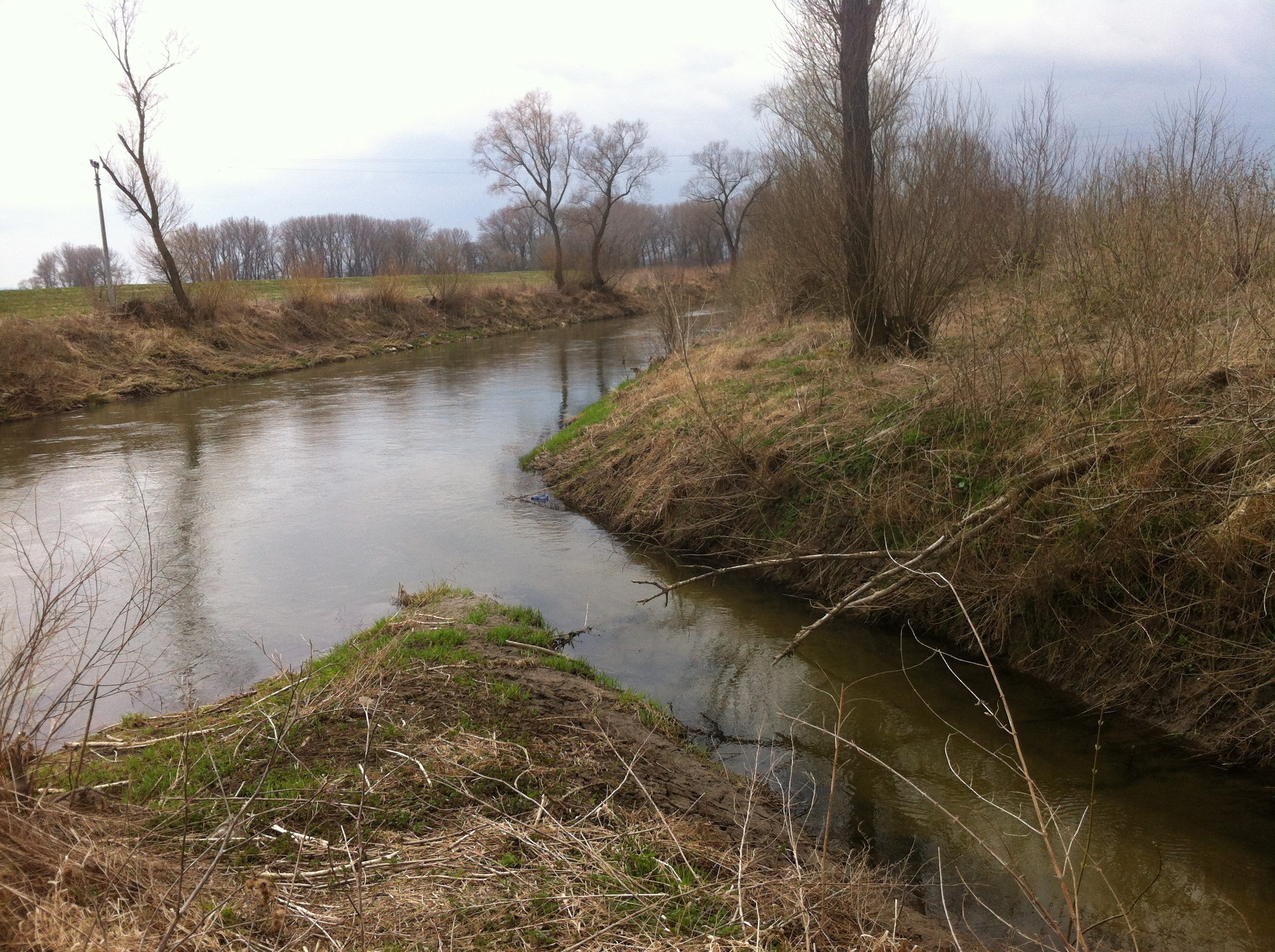 pravý prítok Bojnianka ústi do Nitry